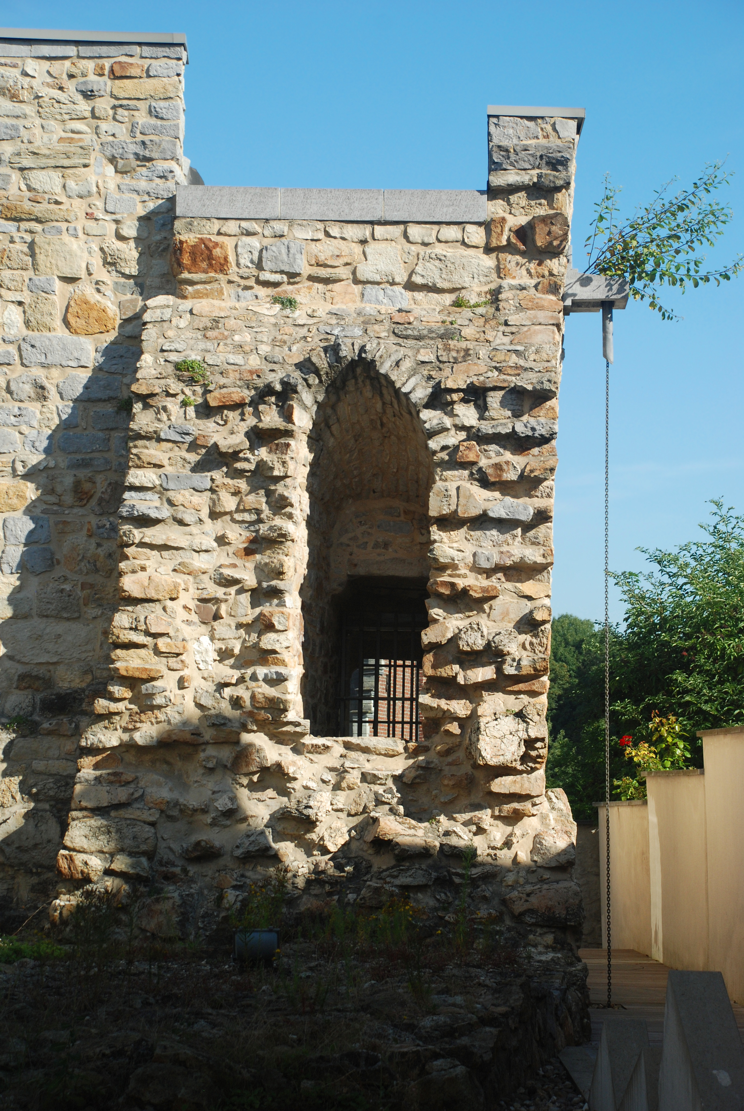 Belgique - Brabant wallon - Tour Simone